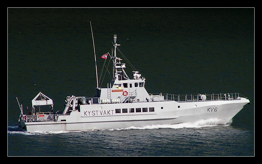 Kystvakt.